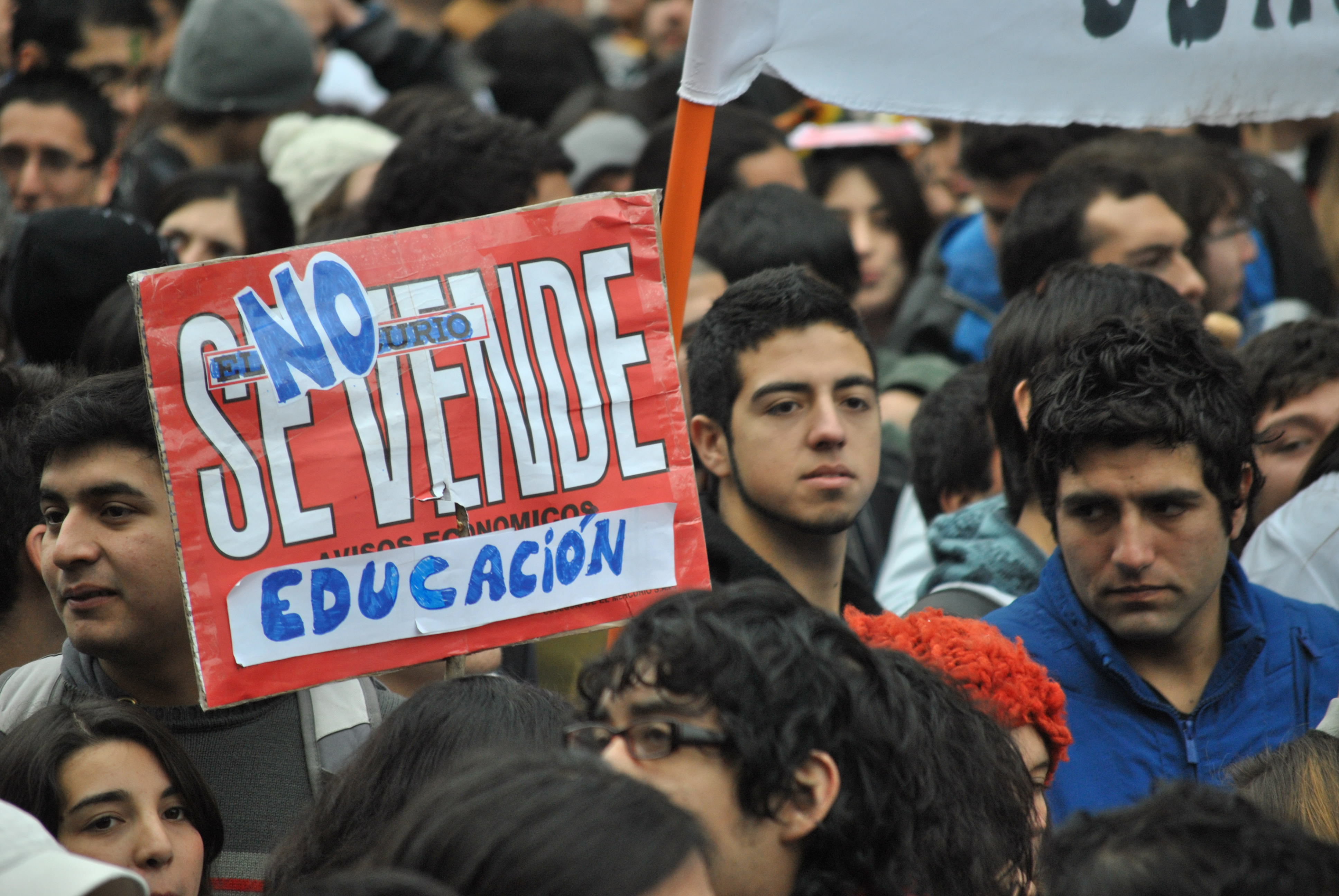 Movilización estudiantil de 2011 en Chile: marcha del 30 de junio de 2011.